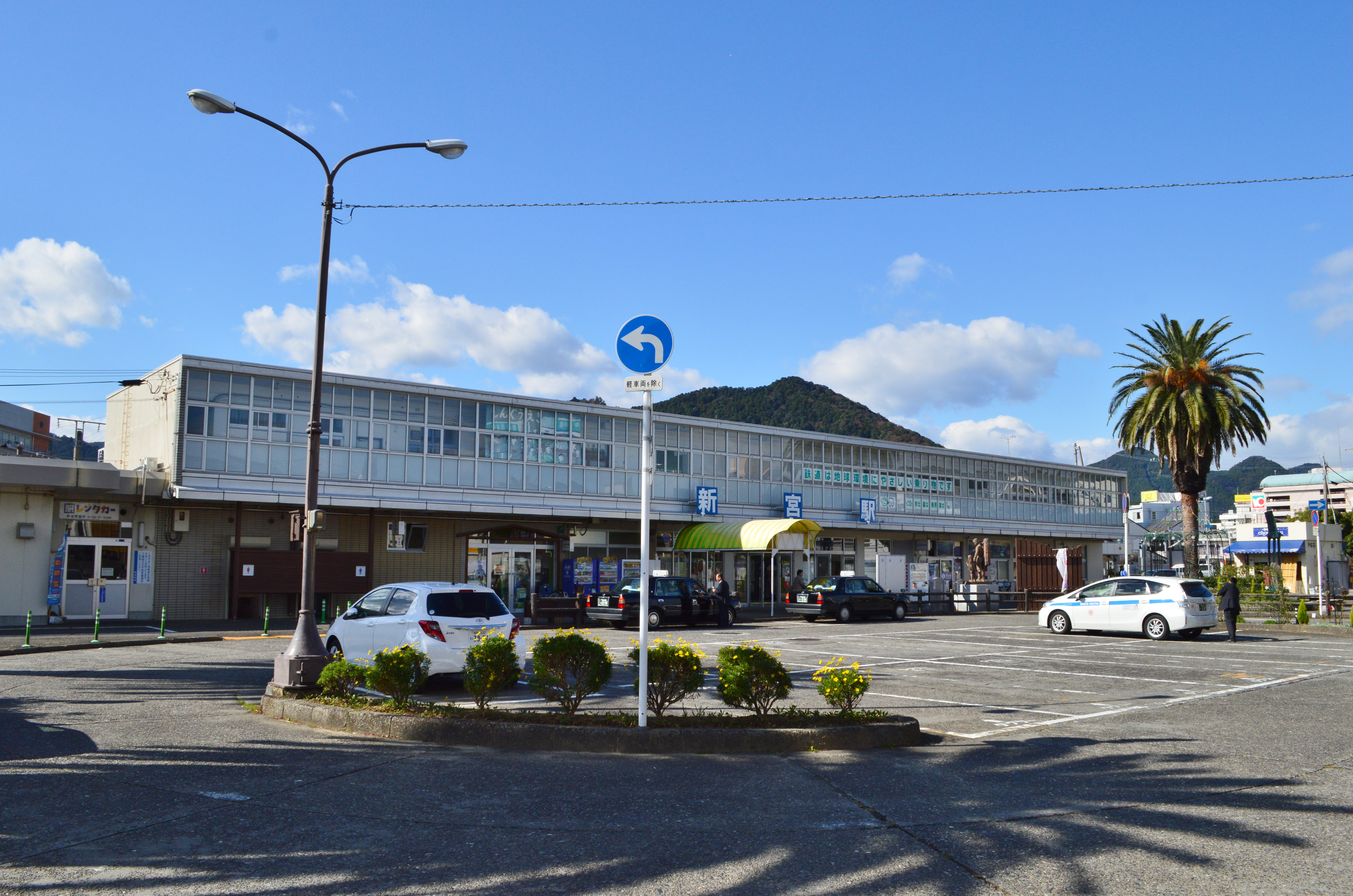 新宮駅 駅舎